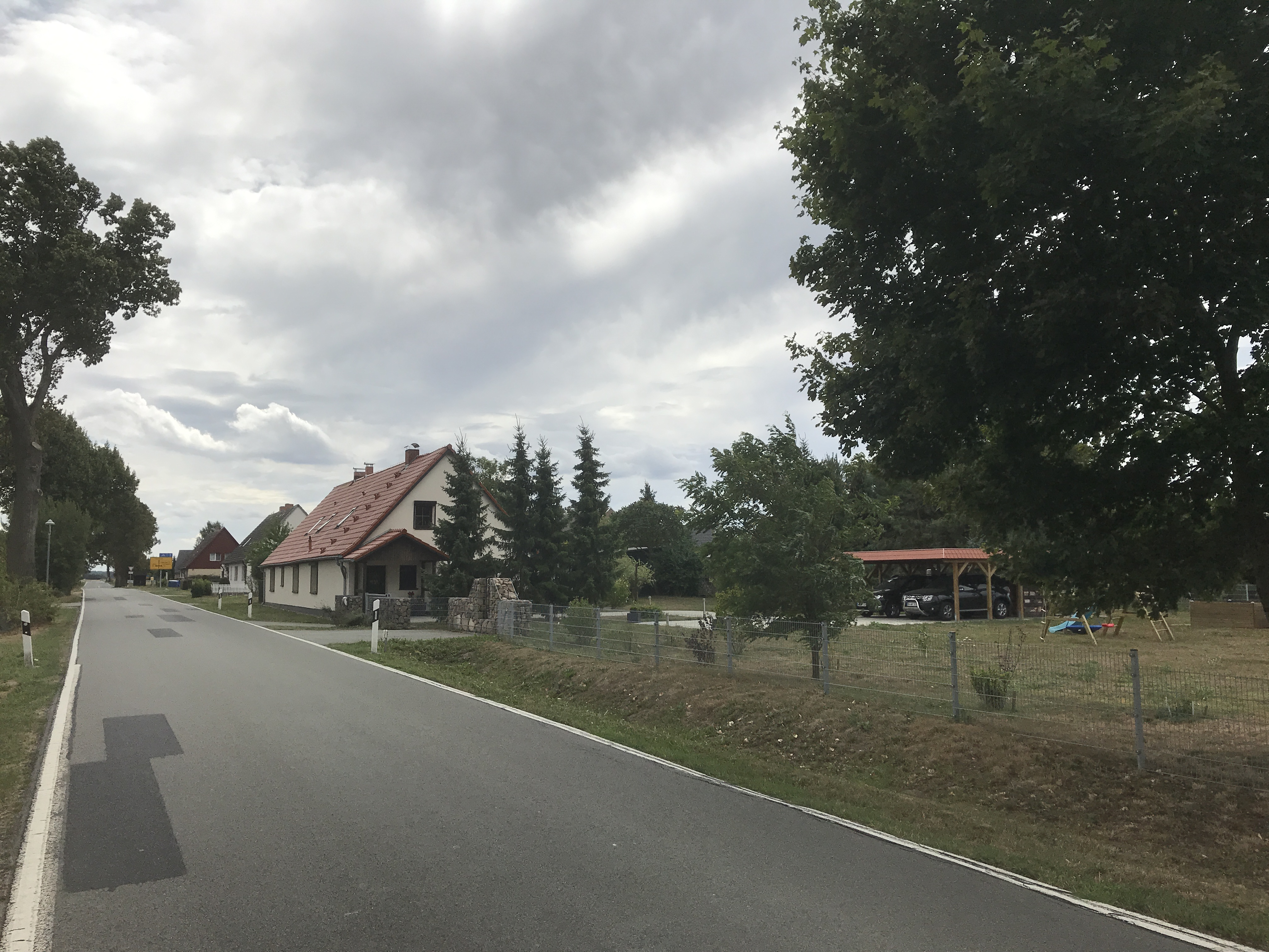 Albinshof, ein Ortsteil der Gemeinde Krien in Mecklenburg-Vorpommern